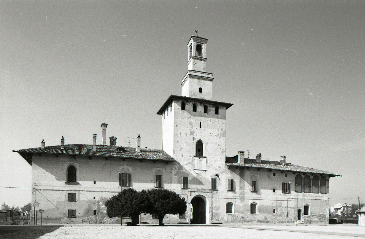 Cusago. Castello. Edizioni Rusconi. Servizio fotografico : Cusago, 1980 / Paolo Monti. - Strisce: 1, Fotogrammi complessivi: 5 : Negativo b/n, gelatina bromuro d'argento/ pellicola ; 35 mm. - ((Sul portanegativi: N[I]K[MA]T FP4 e iscrizione: "Castello di Cusago 33/37". - Confronta scheda 3560Lpbn33-37. - Occasione: Documentazione per la pubblicazione: Vincenti Antonello, "Castelli viscontei e sforzeschi", Milano, Rusconi immagini, 1981. - di Paolo Monti: Nikon Leika 3001-/ Monti 1978 (1978-1982), presso Archivio Paolo Monti. - Fonte: Monografia di Vincenti, Antonello: Castelli viscontei e sforzeschi, Milano, Rusconi immagini (1981). - Fonte: Agenda